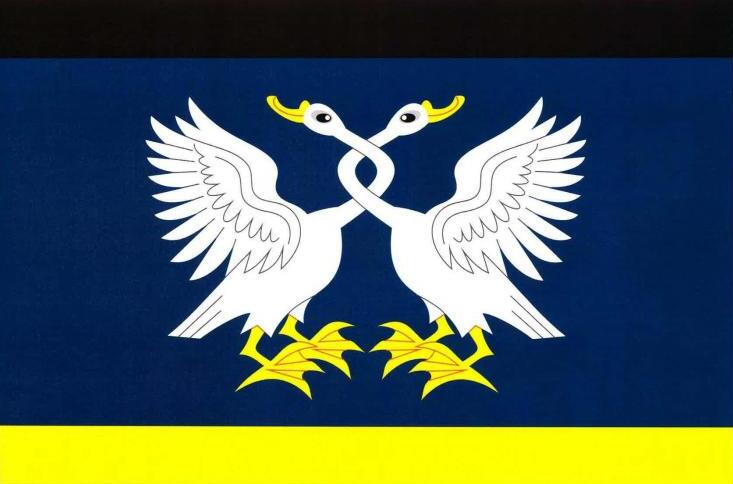 vlajka, Chvalatice, okres Znojmo